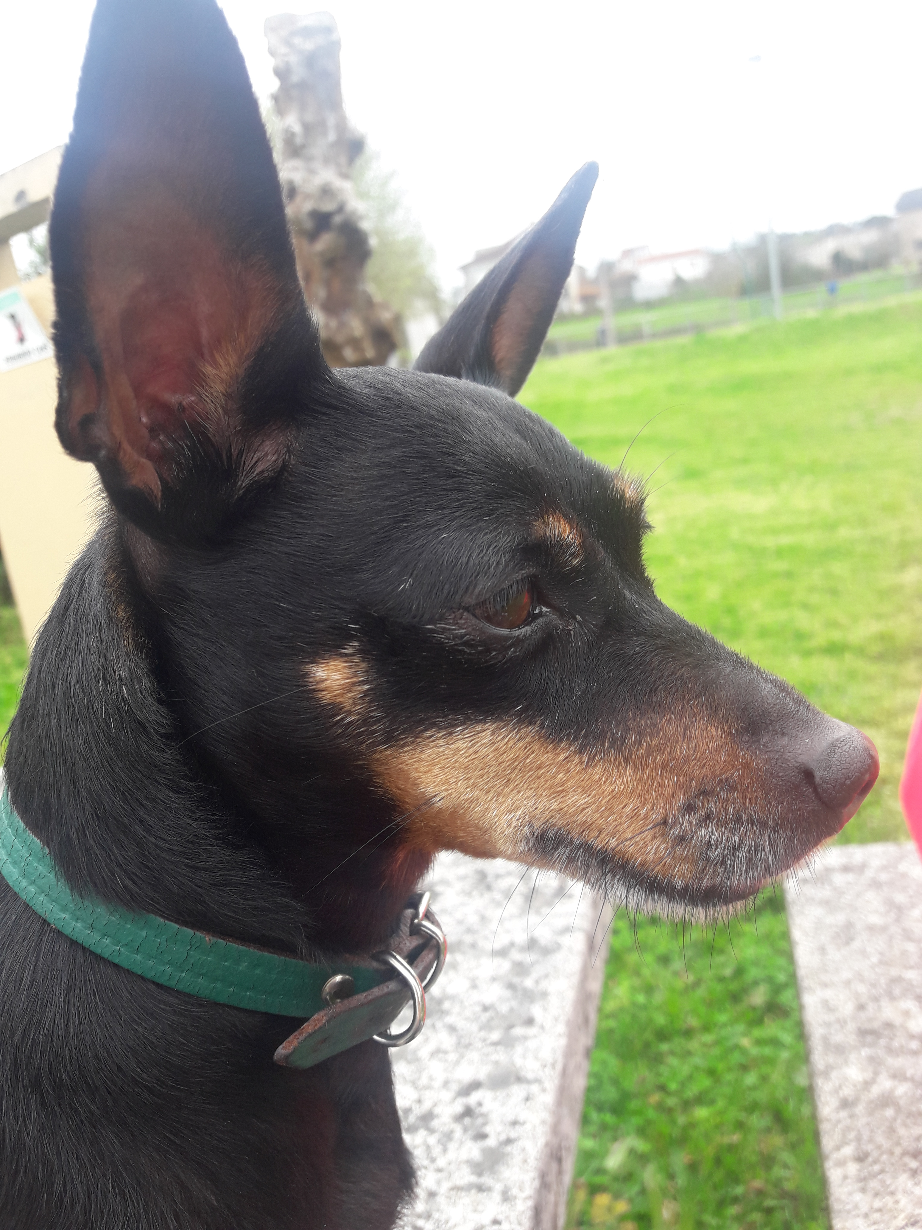 Foto Pinscher Miniatura